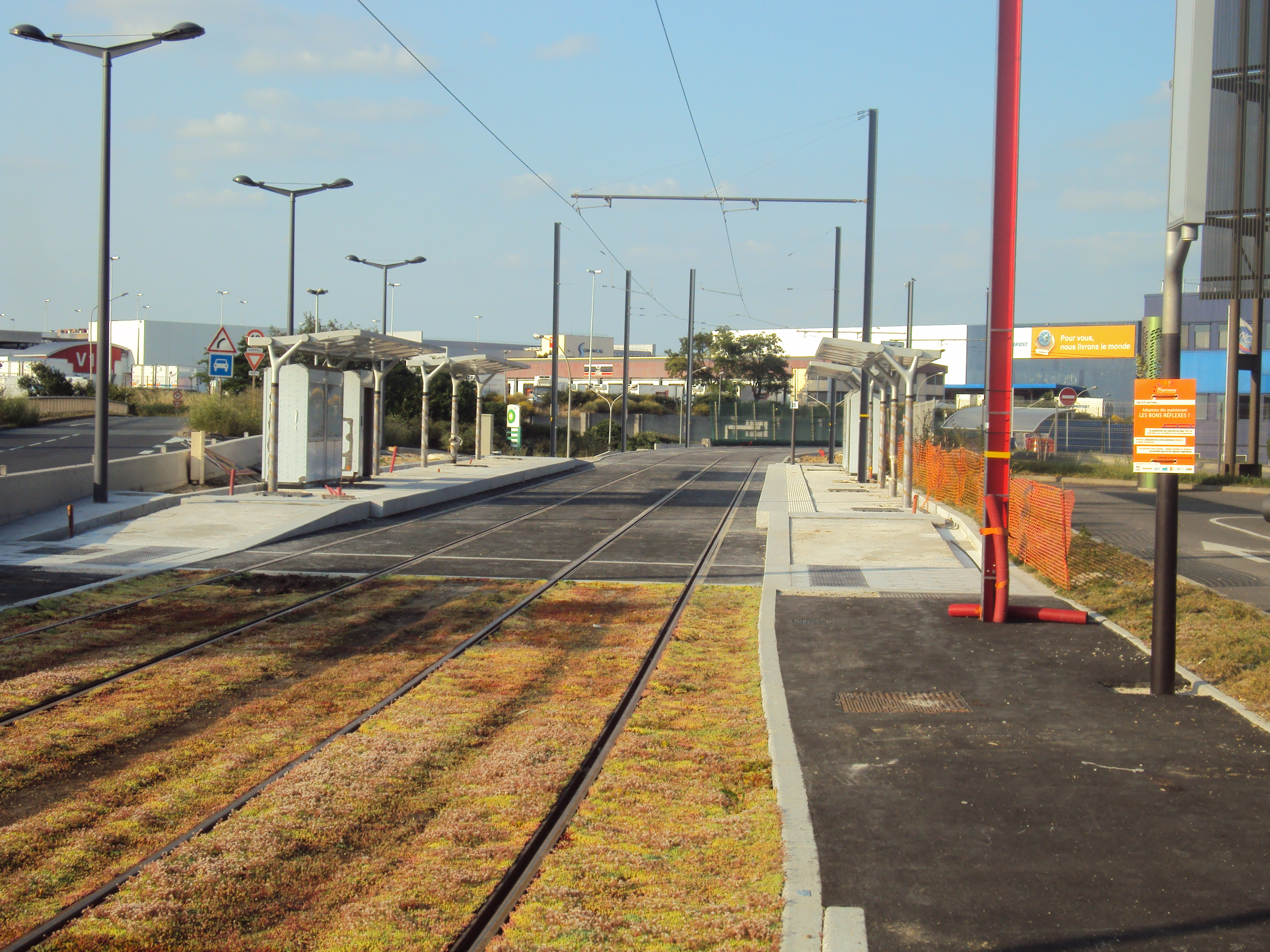 Travaux T7 au MIN